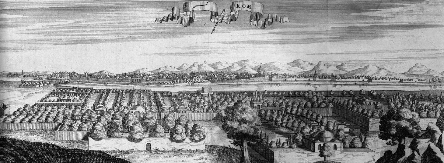 Vue de la ville de Qom, Iran